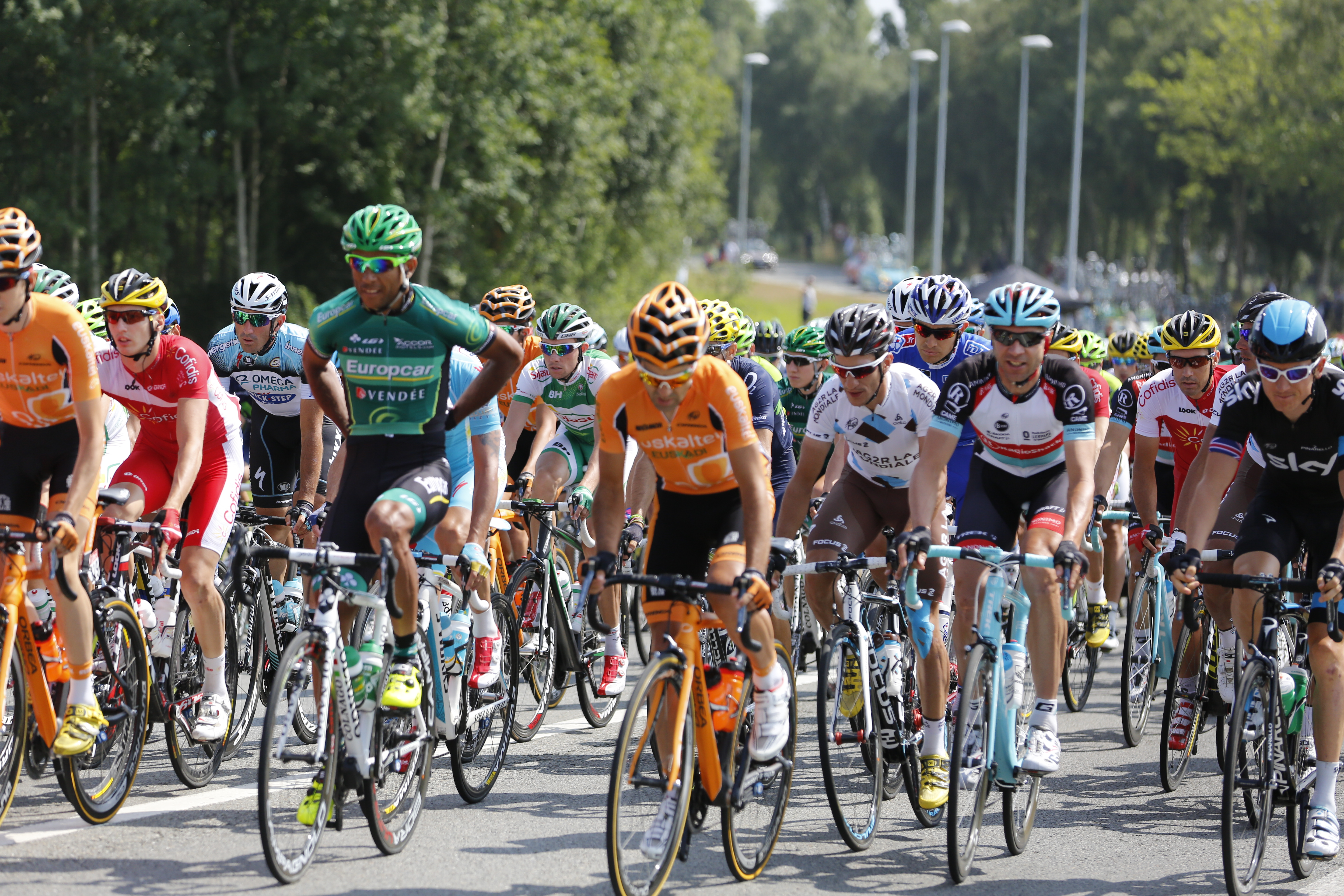 Le peloton au départ de la 12e étape du Tour de France 2013 sur la Route nationale 12 à Javené.